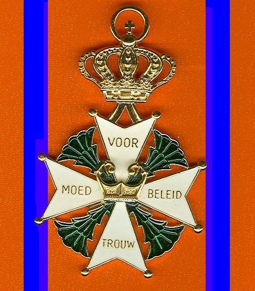 Uit mijn eigen verzameling. Eigen scan. Op dit 19e eeuwse kruis berust geen auteursrecht. Robert Prummel 30 mei 2006 02:31 (CEST)